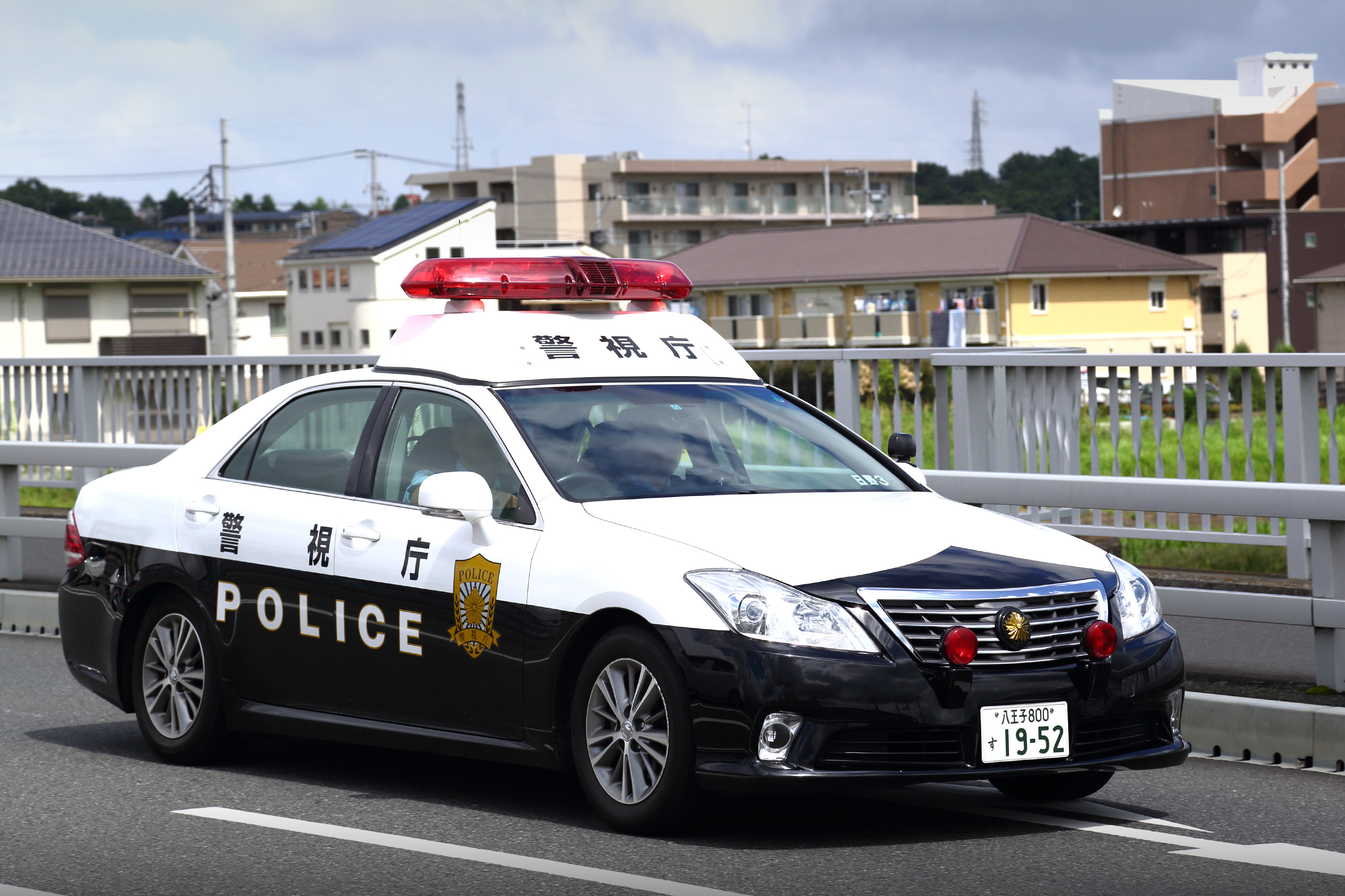 トヨタ・12代目クラウンのja:パトロールカー。 警視庁第九方面、日野警察署車両。